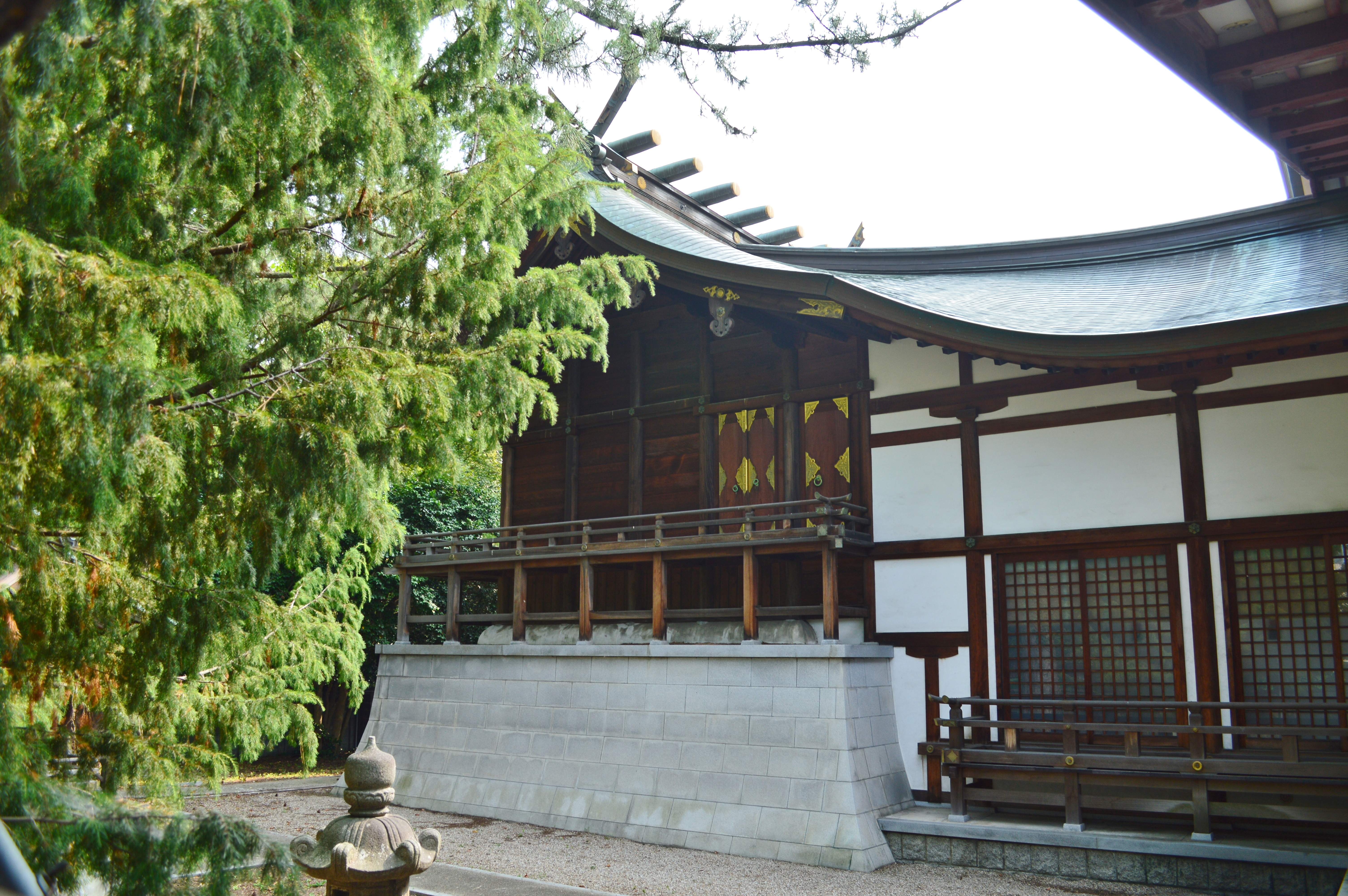 氣比神宮 本殿